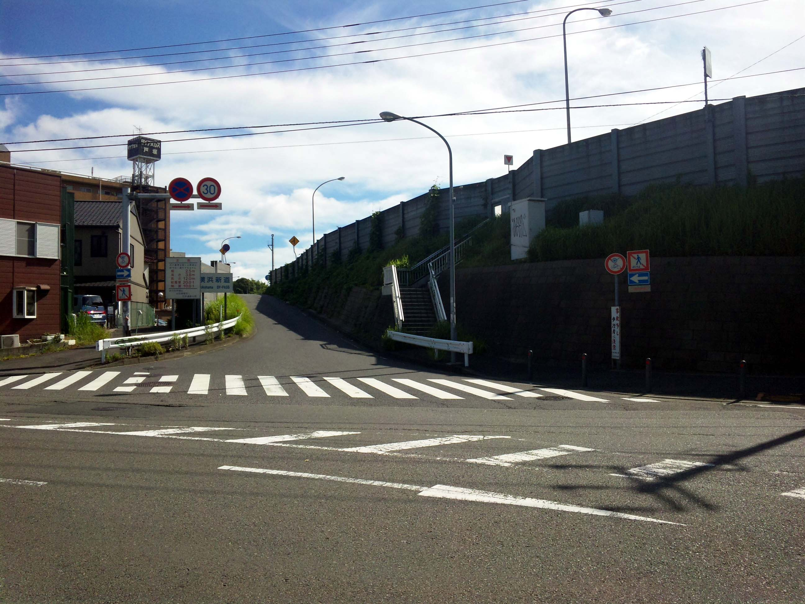 横浜新道ja:上矢部インターチェンジ下り入口NTTドコモSH-02Bにて撮影